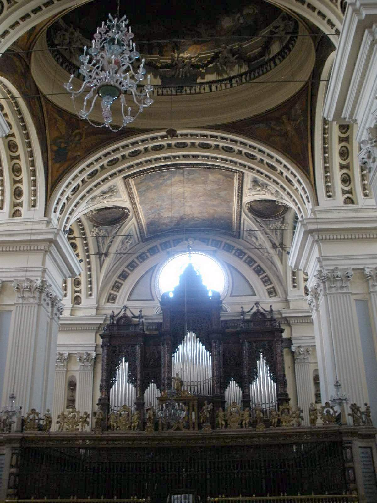 Catedral-Basílicade Nuestra Señora de Pilar, Zaragoza (España)